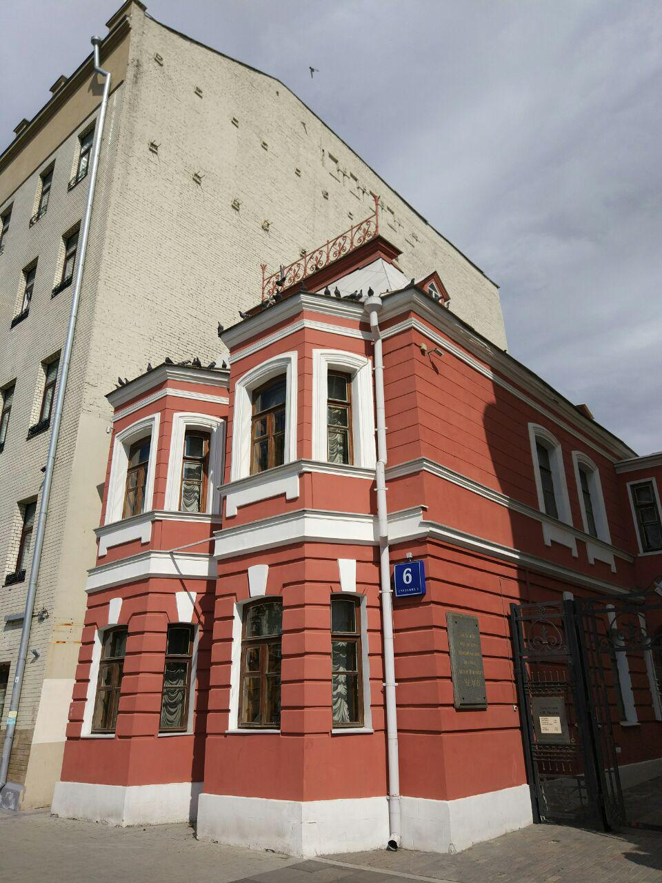 Дом-музей А. П. Чехова, вид с Садовой-Кудринской улицы